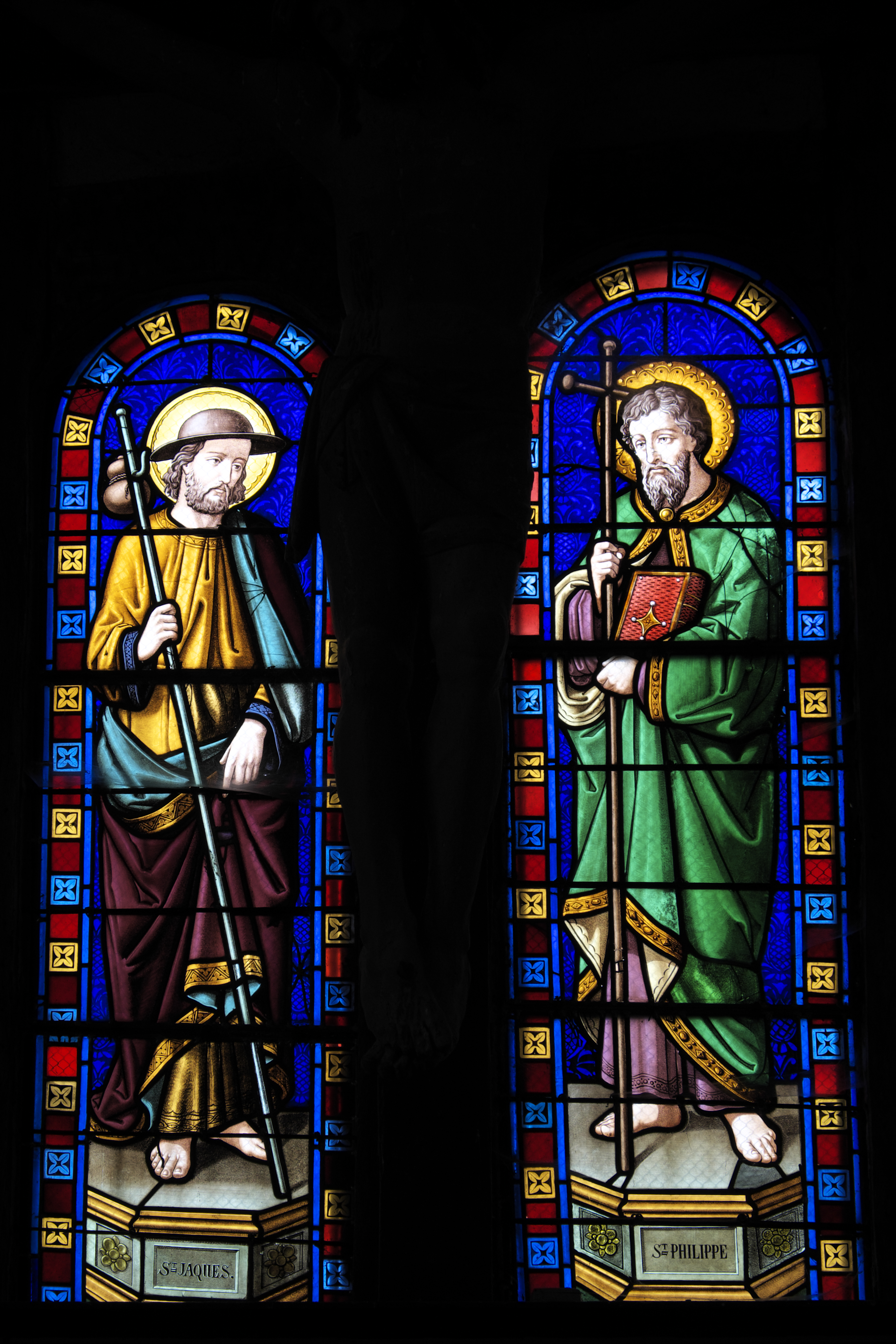 Katholische Kirche Saint-Jacques-et-Saint-Philippe in Lentilles im Département Aube (Champagne-Ardenne/Frankreich), Bleiglasfenster im Chor, Darstellung: Apostel Jakobus der Ältere und Philippus .